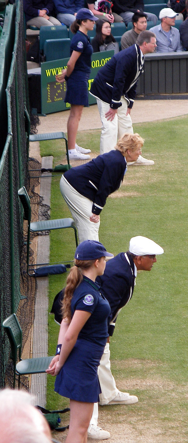 Line judges on Wimbledon's centre court